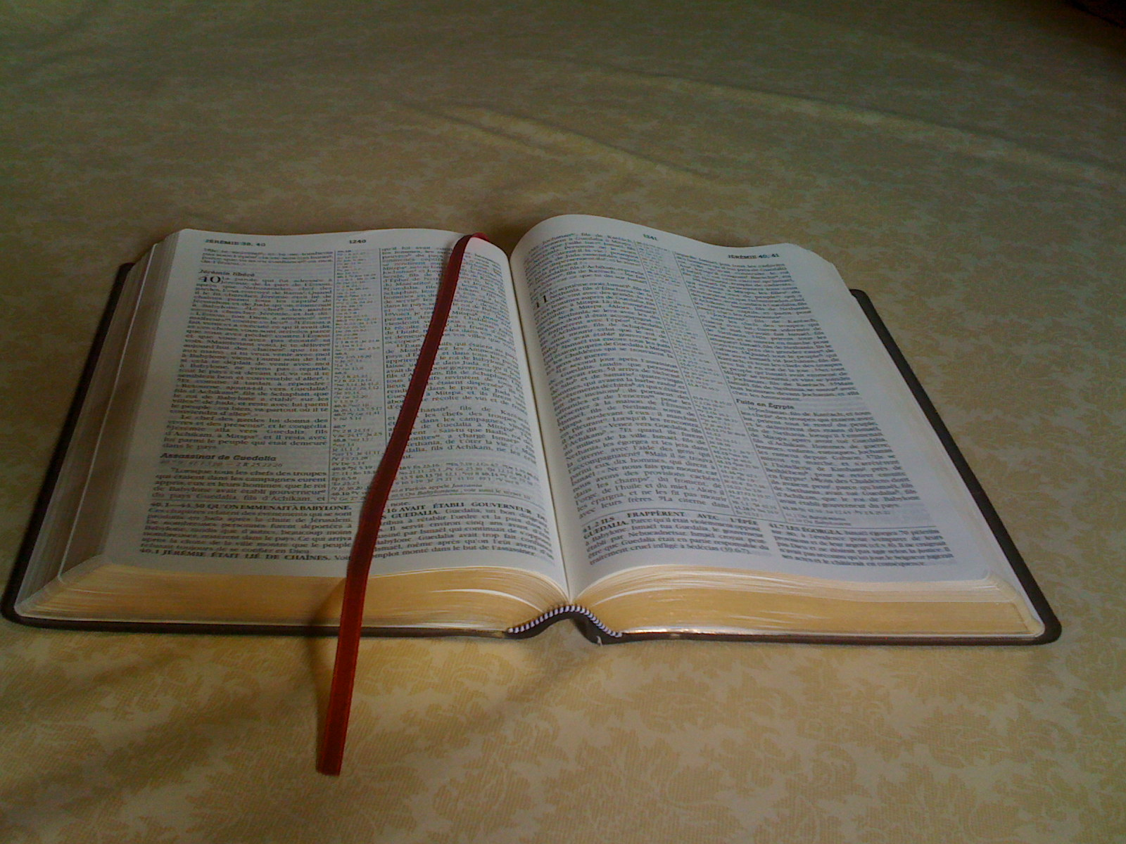 Bible en français